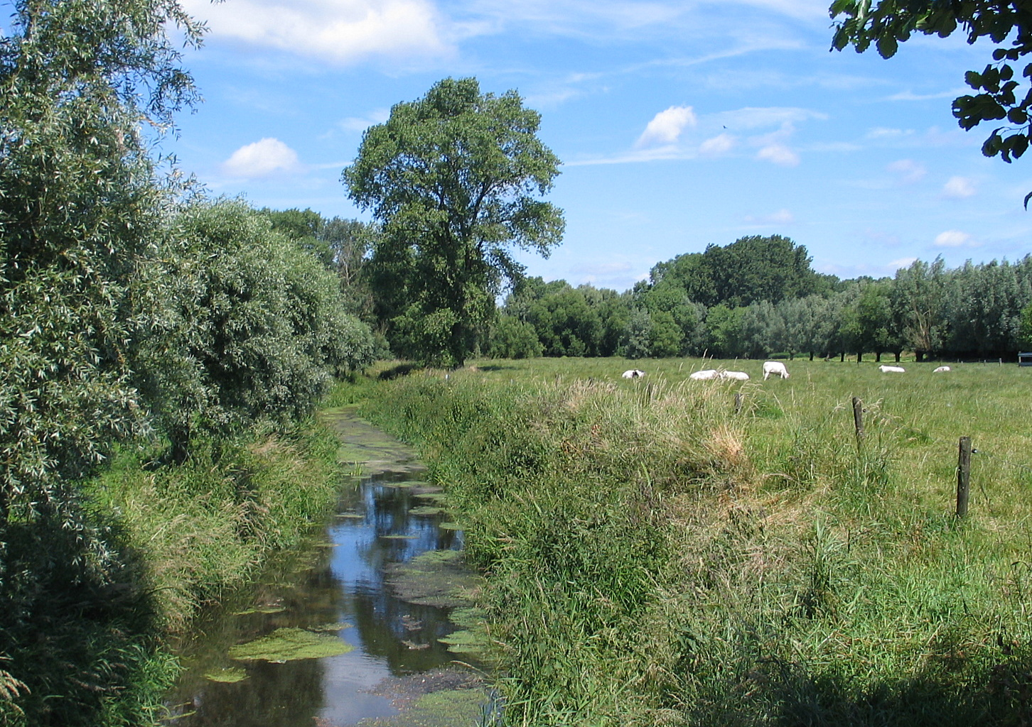 Oude Kale in Vinderhoute, België